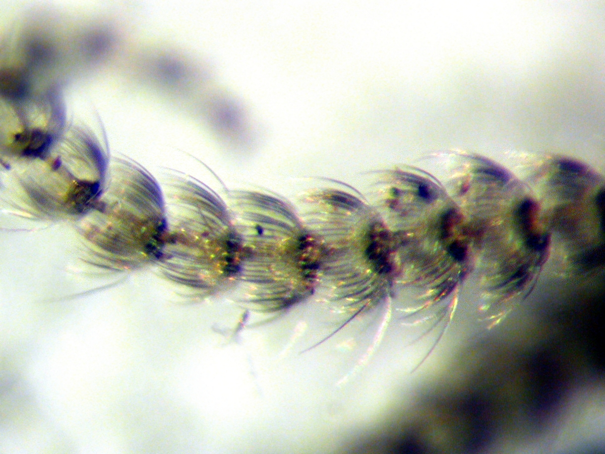 Psychodidae spec, Schwanheimer Düne, Frankfurt am Main, Hessen, Deutschland